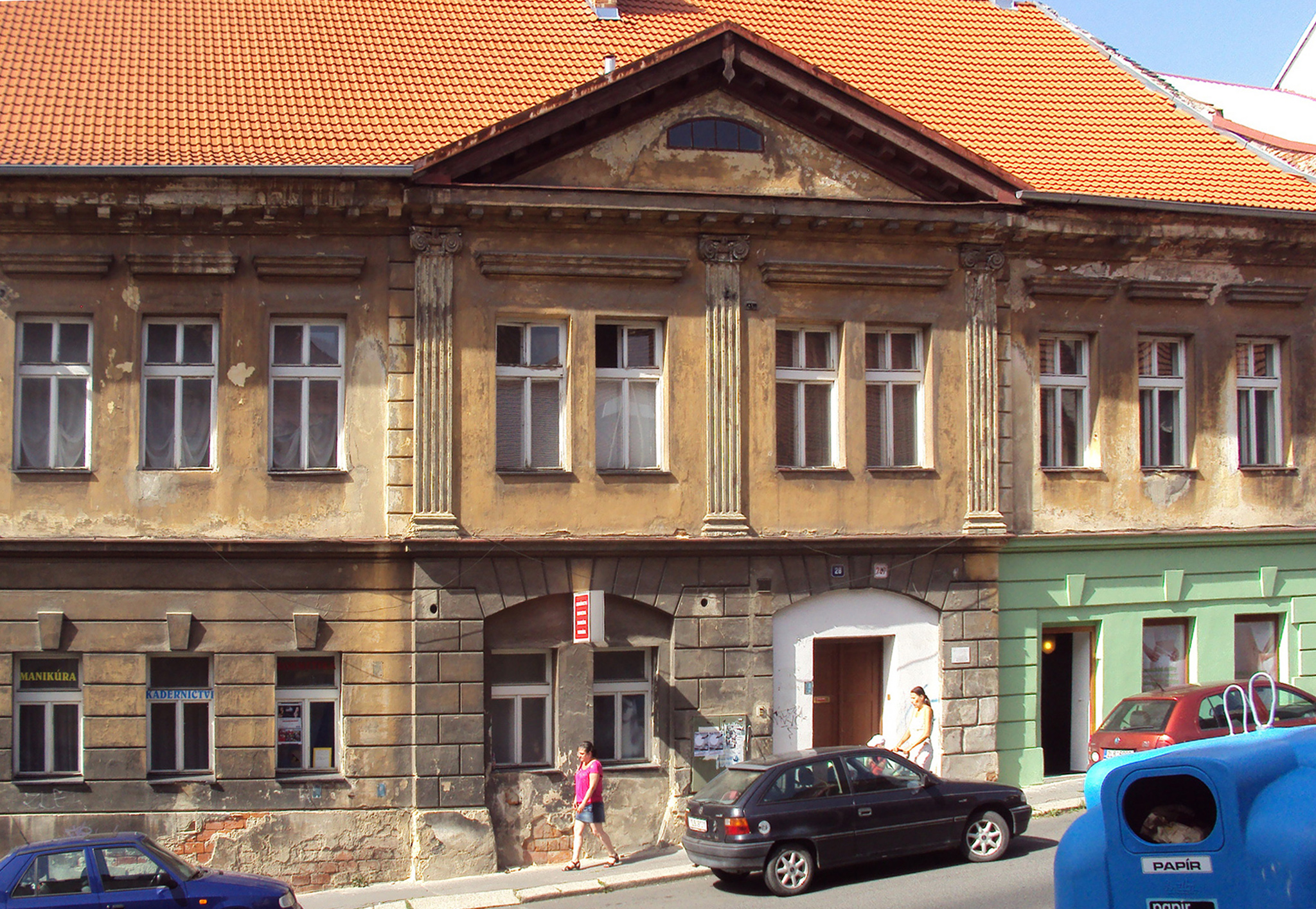 Brumofův dům (čp. 707) v Jiráskově ulici v České Lípě. Nemovitá kulturní památka